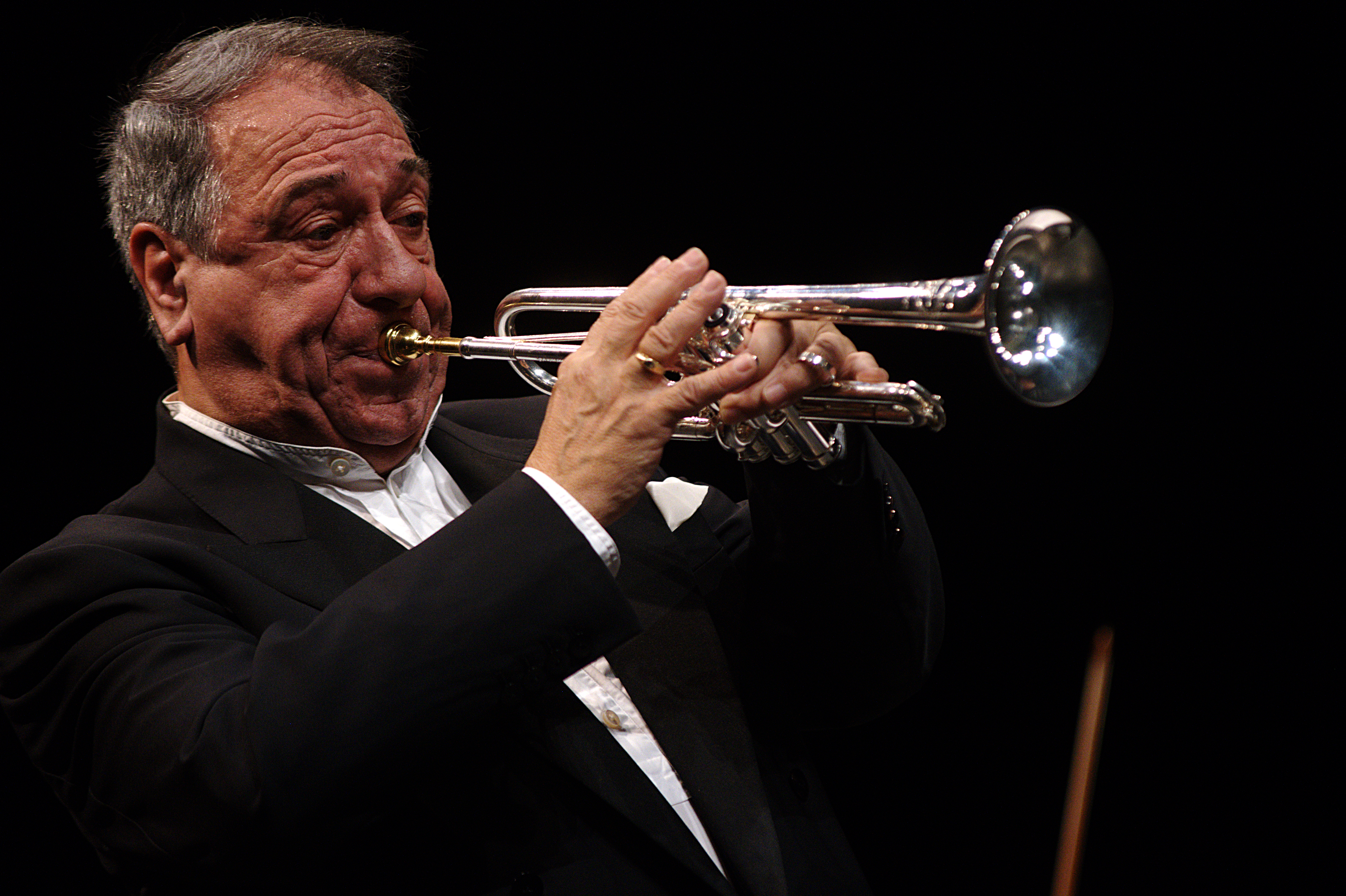 Guy Touvron en concert au théâtre de la ville de Valence (France) le 18 novembre 2017.